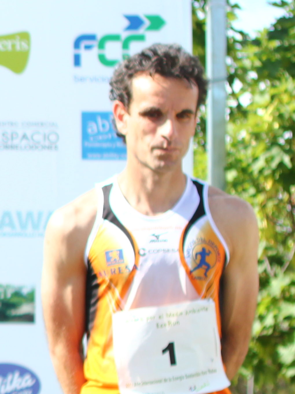 Palabras Nieves Herrero en la Carrera del Medio Ambiente -Ecorun 2012